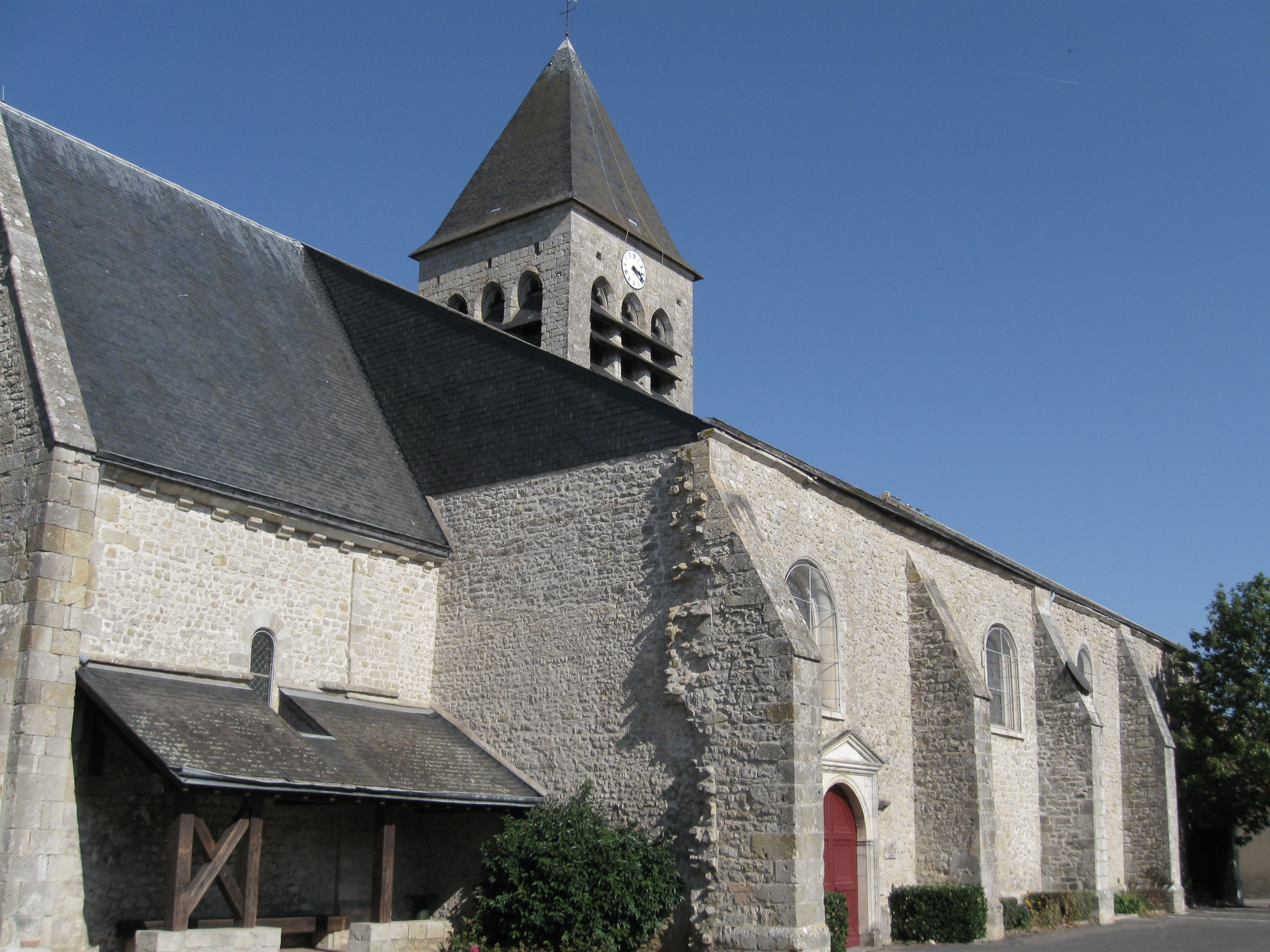 Église Saint-Georges, Bou, Loiret, France